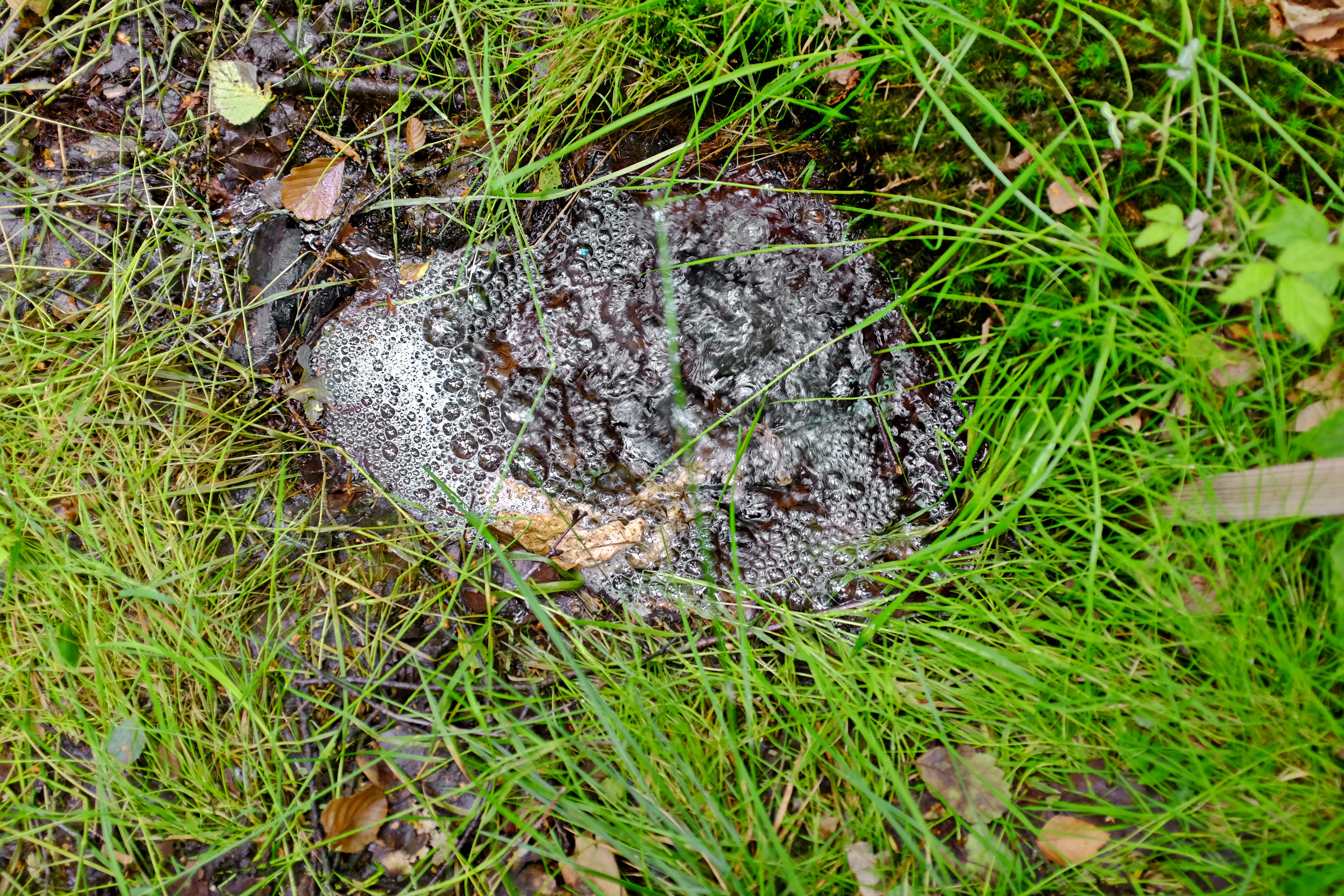 Mofeta Bublák u Vackovce v NPP Bublák a niva Plesné, okres Cheb